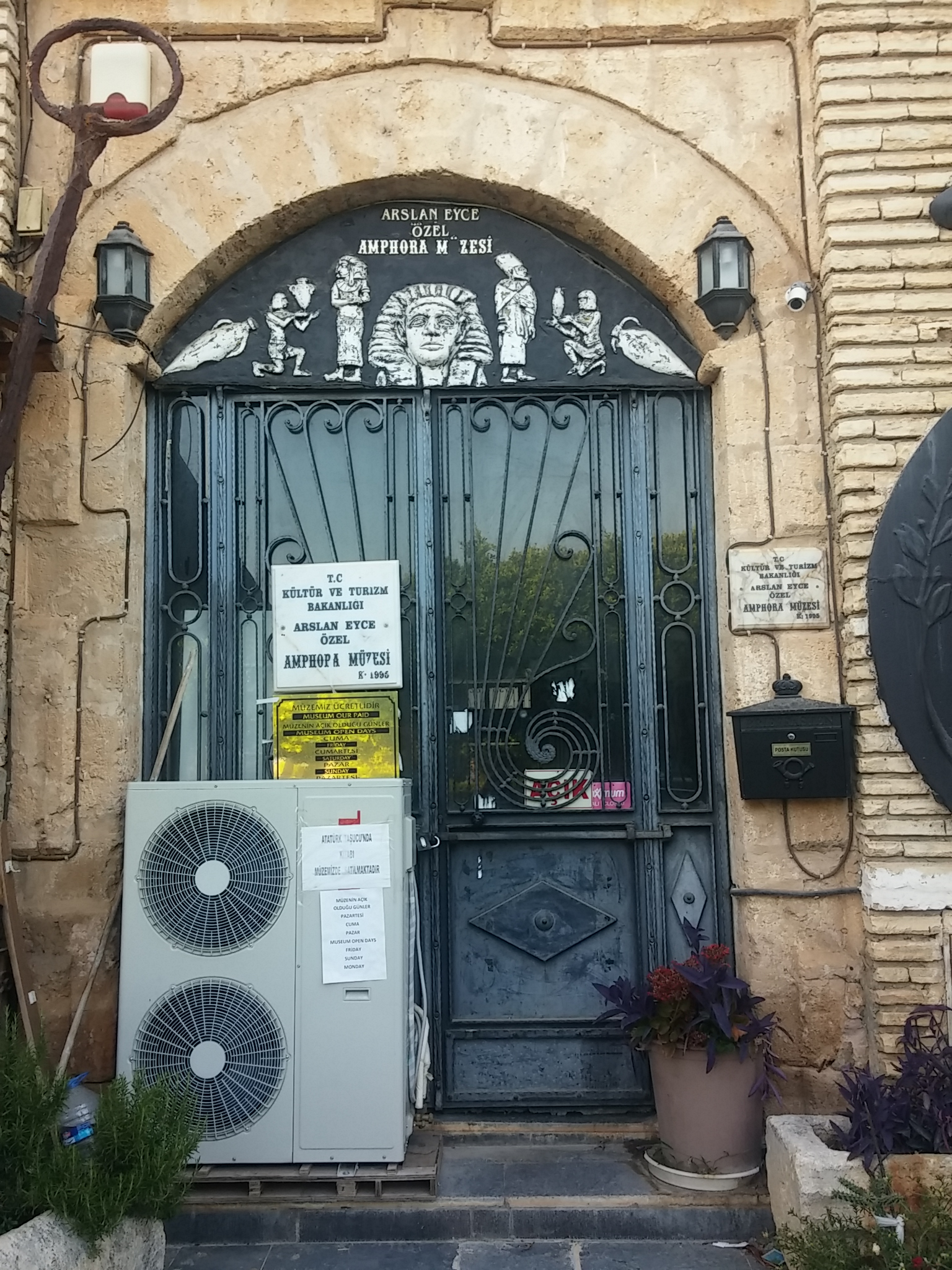 Mersin'in Silifke ilçesinin Taşucu mahallesinde yer alan Arslan Eyce Özel Amphora Müzesinin girişi.